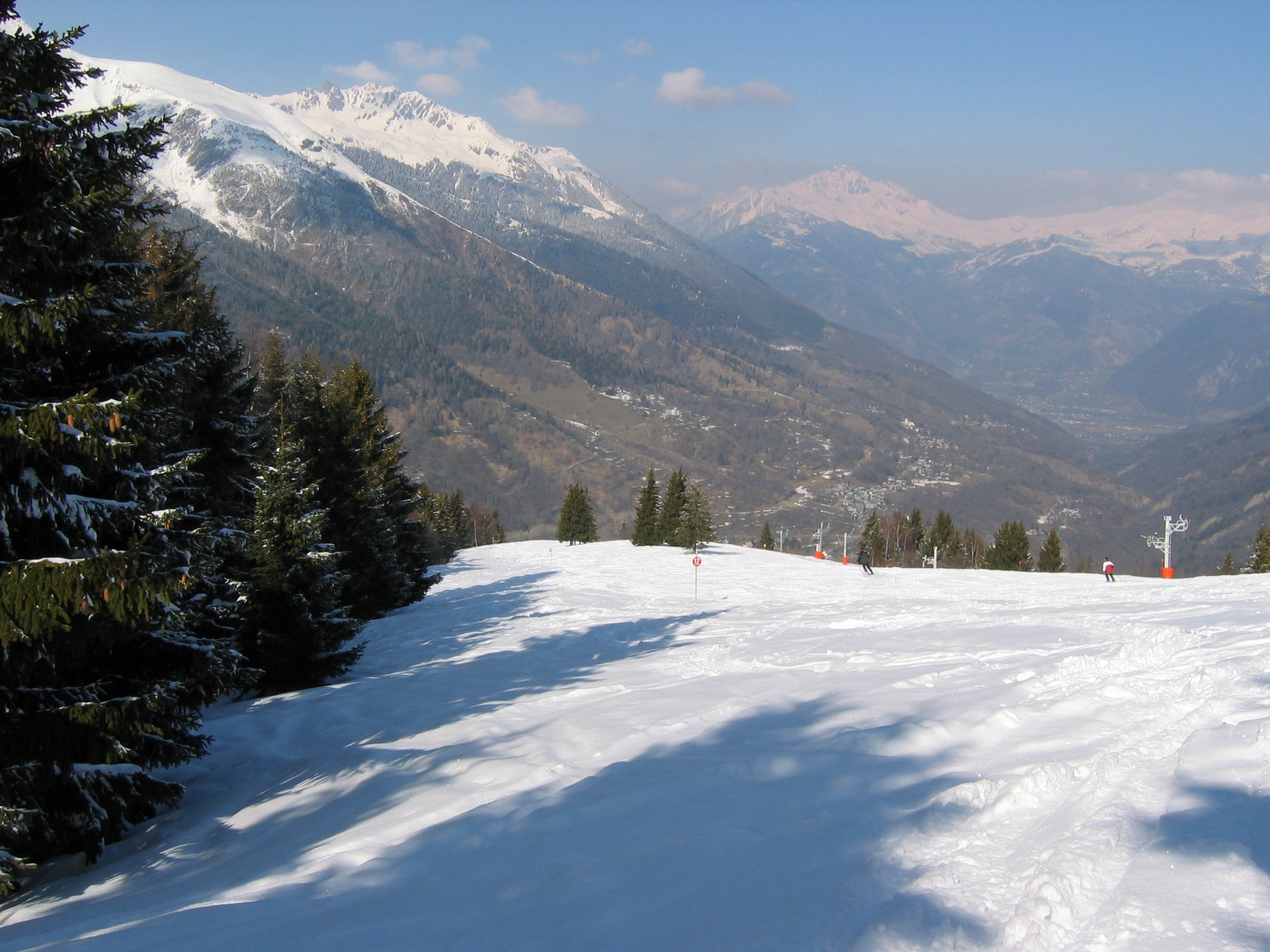 Photographie du dommaine skiable des Sybelles, du côté de Saint-Colomban-des-Villards, prise par Accrochoc en mars 2004